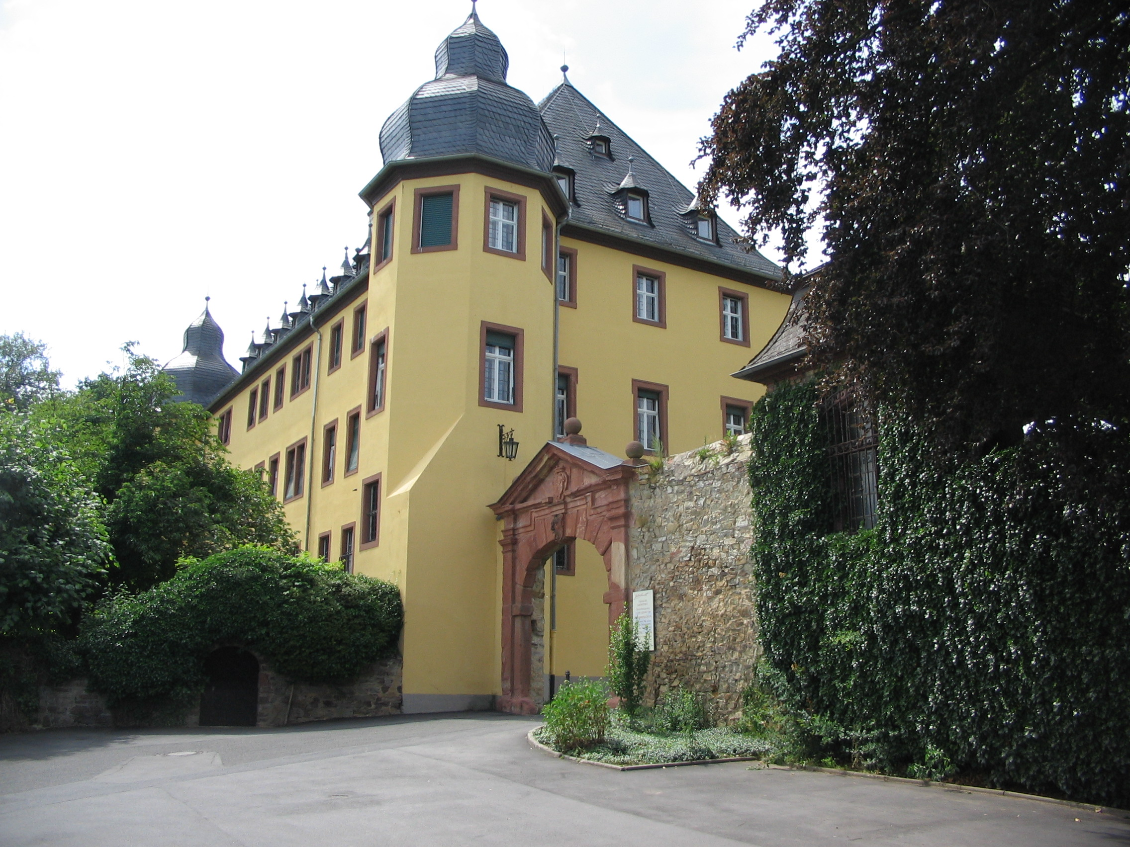 Hauptgebäude von Schloss Vollrads bei Winkel im Rheingau mit Schlosstor